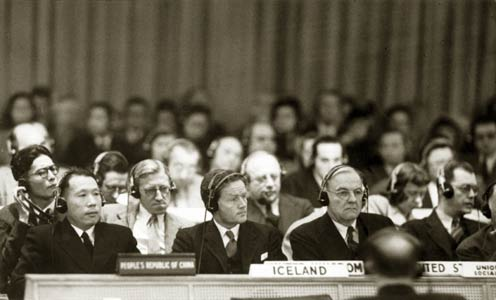 中文（中国大陆）: 1950年，伍修权在联合国安理会